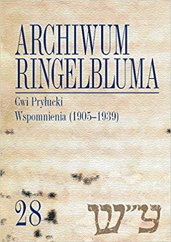 Tsevi Pryłucki Wspomnienia Cover Book covers in Polish